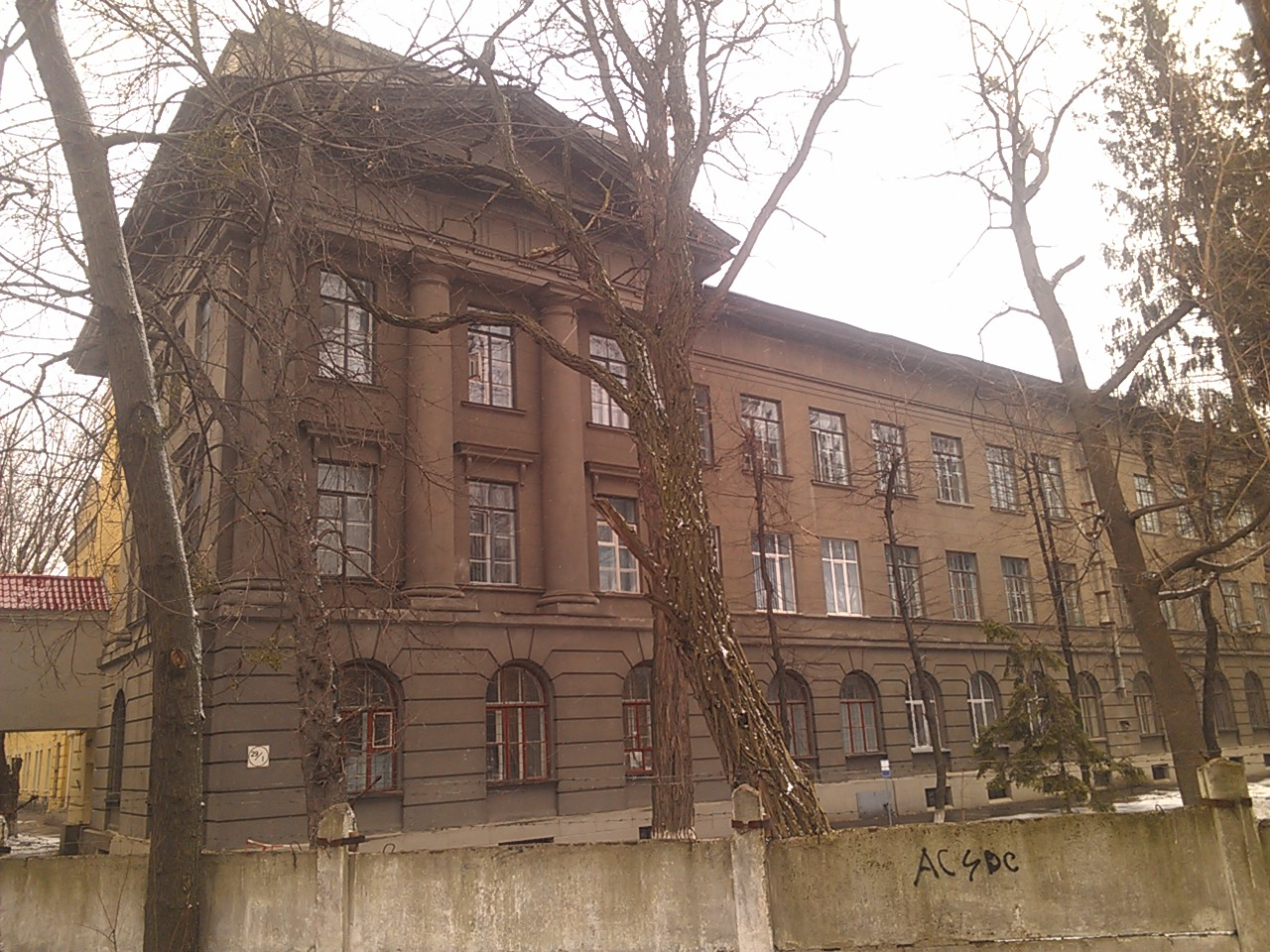 КВВАИУ, Киев, Украина. Крыло главного корпуса училища.